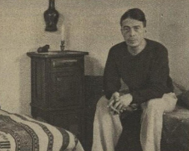 František Tichý (1896-1961), český malíř, ilustrátor, grafik a jevištní výtvarník